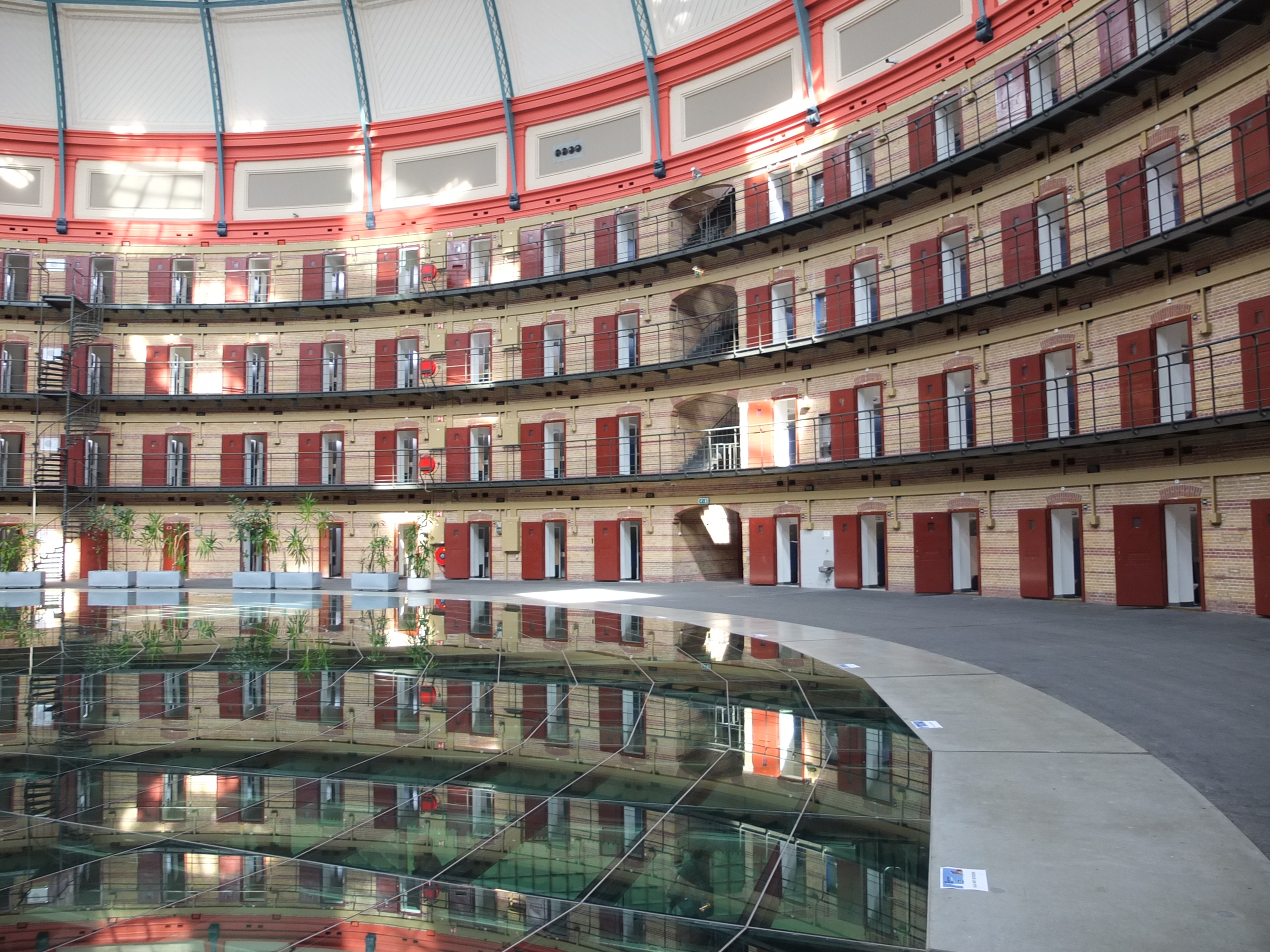 Koepelgevangenis (Breda)